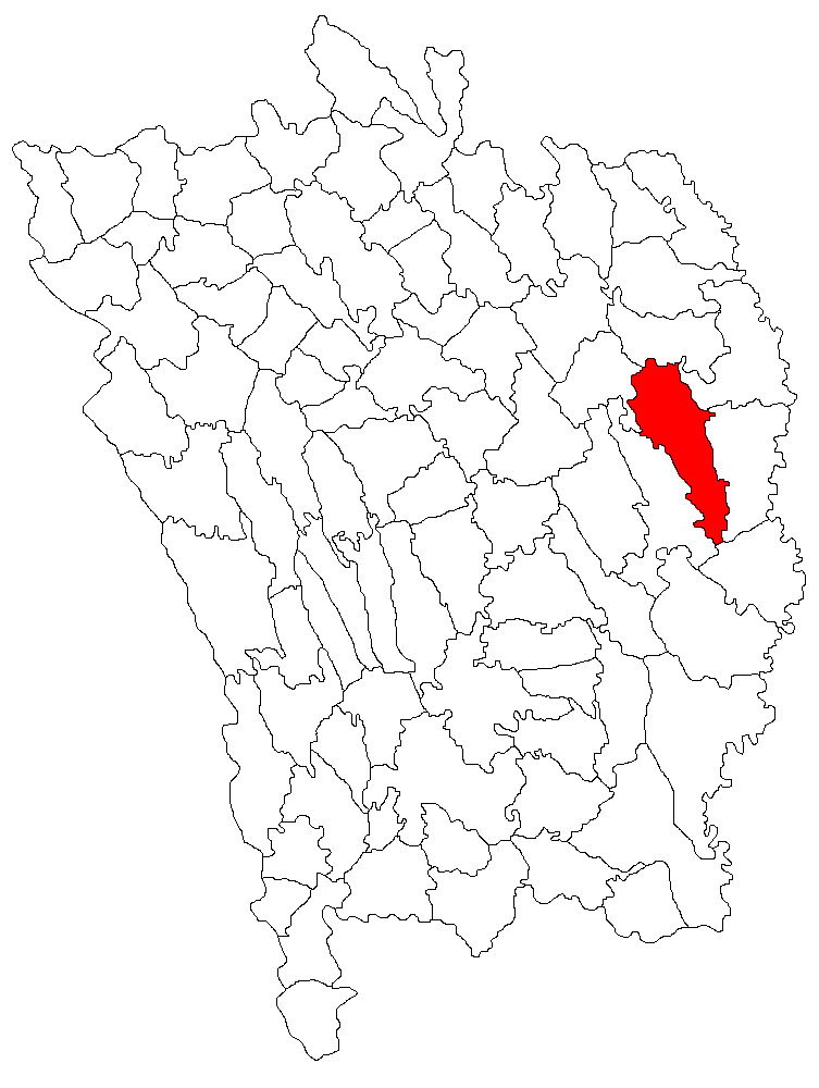 Categorie:Hărţi ale judeţului Vaslui